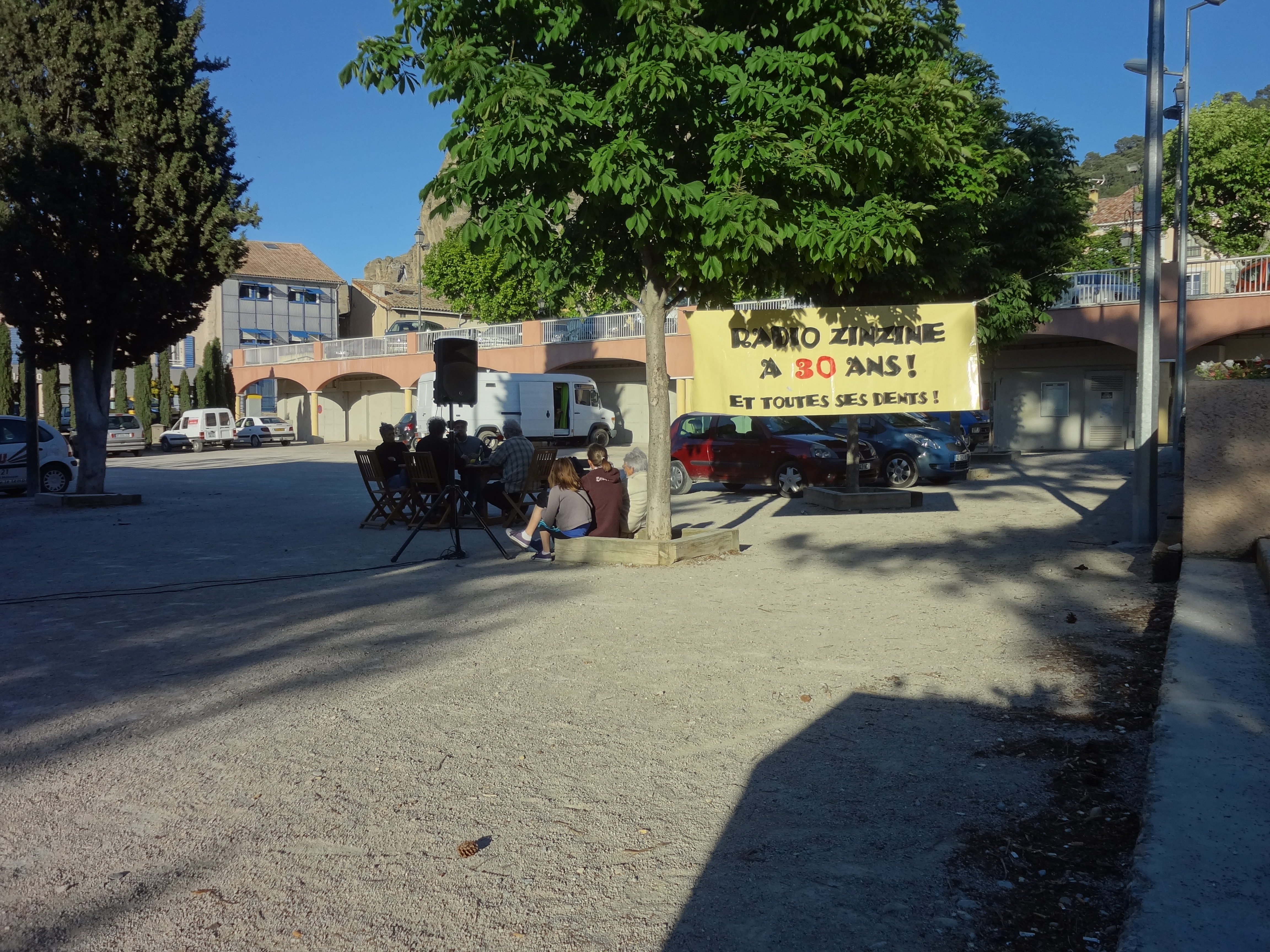 Enregistrement en extérieur de radio Zinzine, radio de la coopérative Longo Maï, sur la place des Mées (Alpes-de-Haute-Provence), avec banderole pour les 30 ans de la radio.